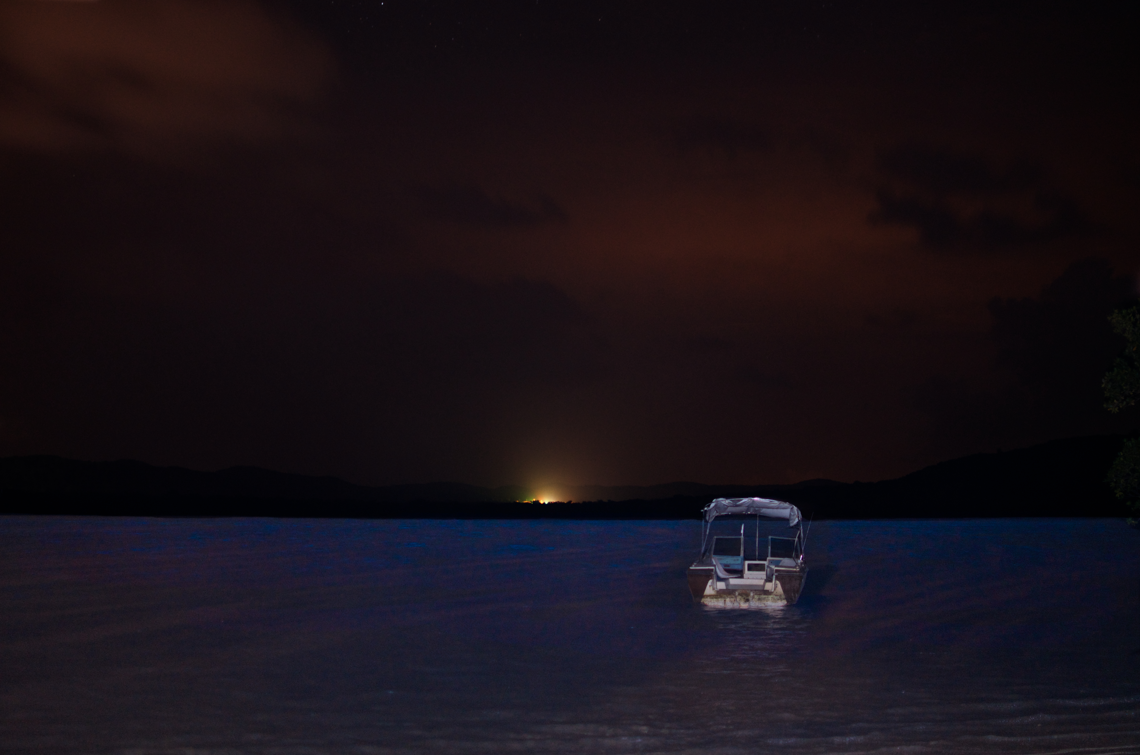 Mosquito bay, Bioluminescent bay, Vieques